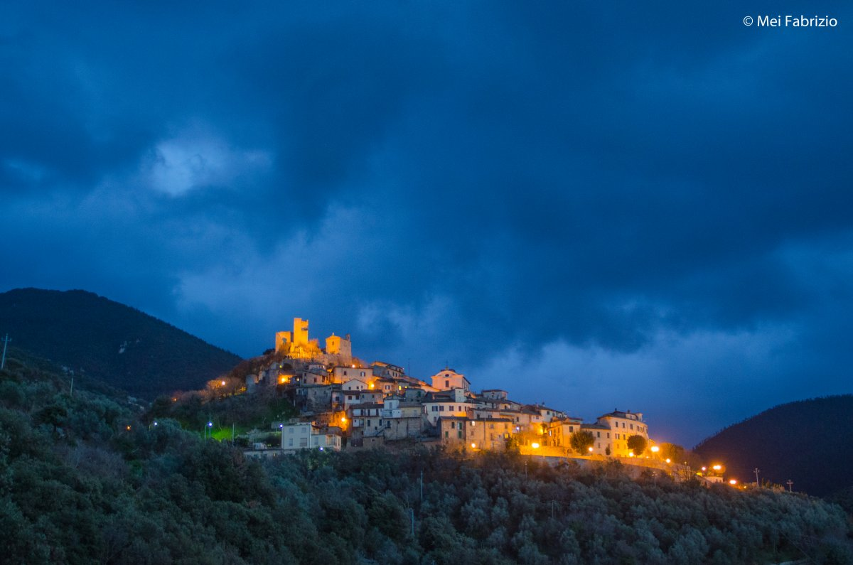 Roccantica .. ora blu